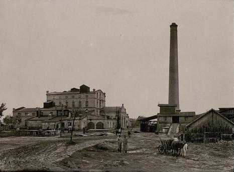 Пивзавод Шнайдера у Луцьку на поч. 20 ст.